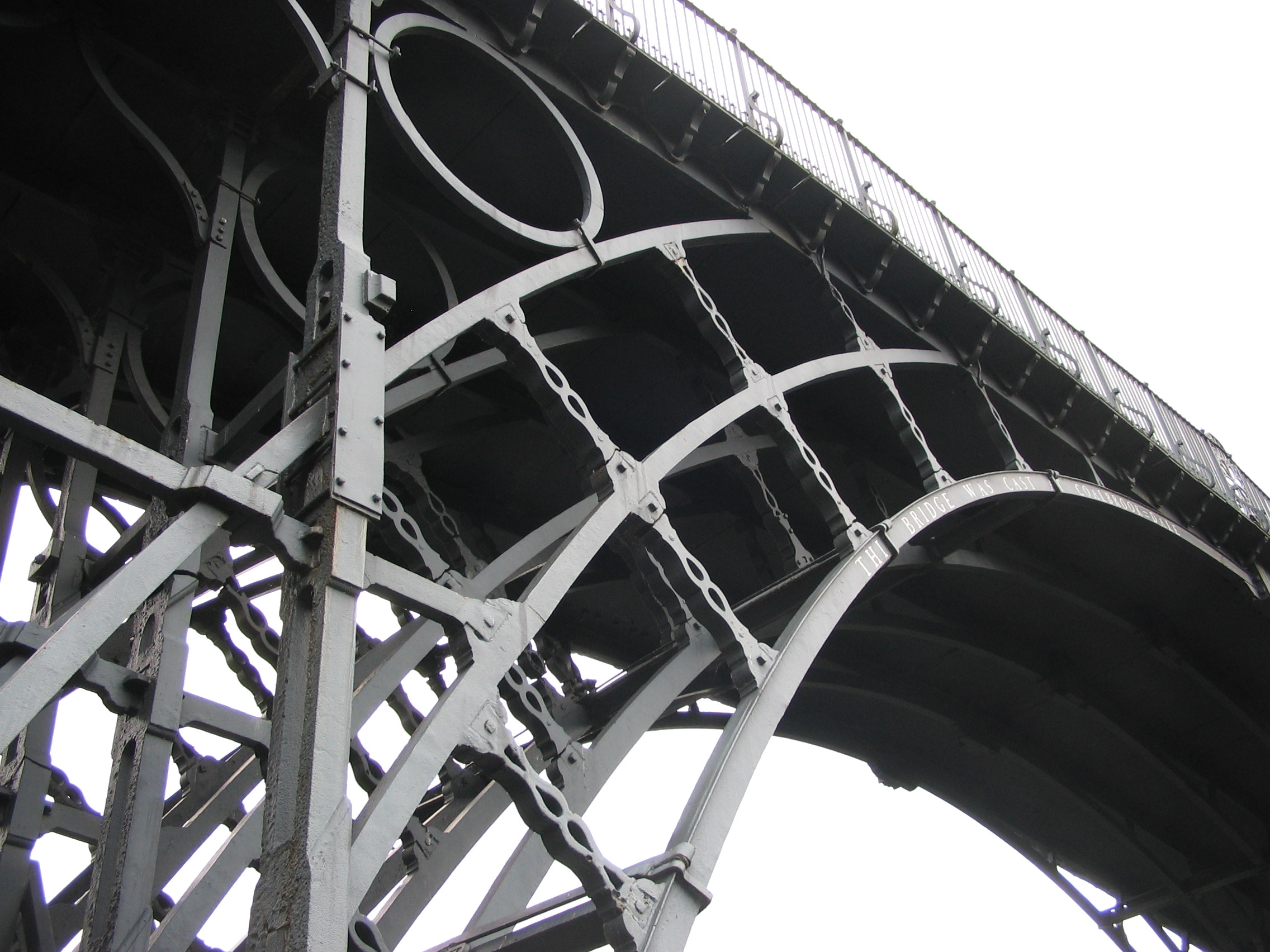 Iron Bridge - detailopname - augustus 2006 - eigen foto